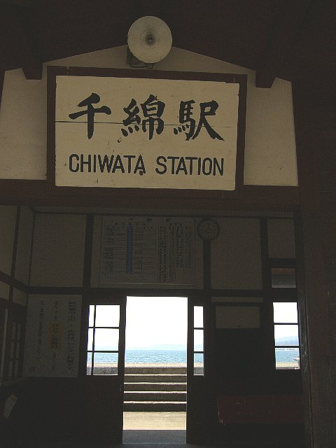 九州旅客鉄道大村線千綿駅 駅舎入口からホーム越しに大村湾を望む 2006年3月 Bakkai撮影